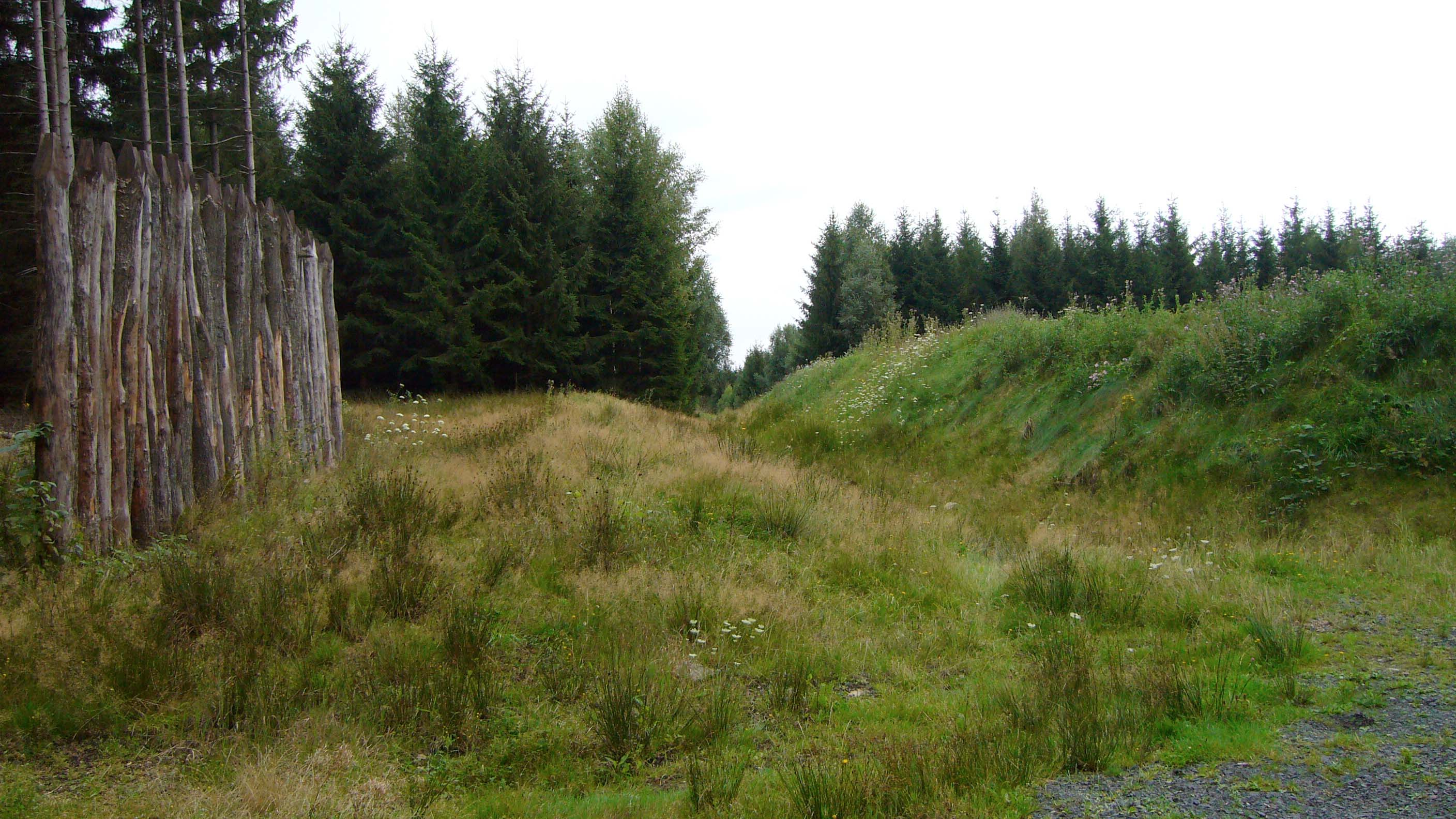 Kastell